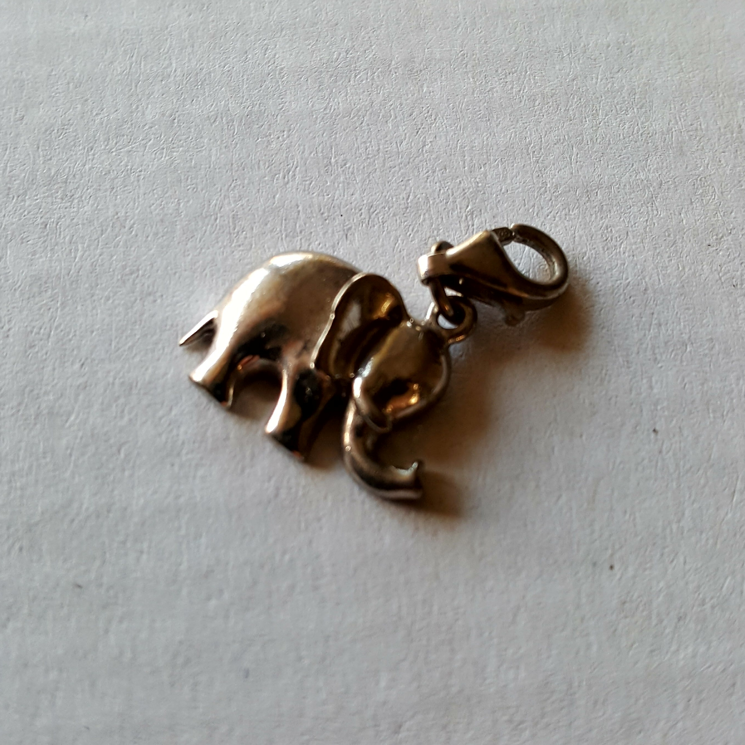 Często talizmany mają kształt zwierząt, dzięki czemu wierzy się, że przypisywane im cechy zostaną przekazane właścicielowi.